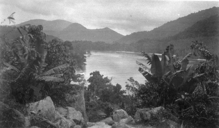 Foto. Pemandangan ke arah Danau Aneuklaot di atas Sabang, Pulau Weh